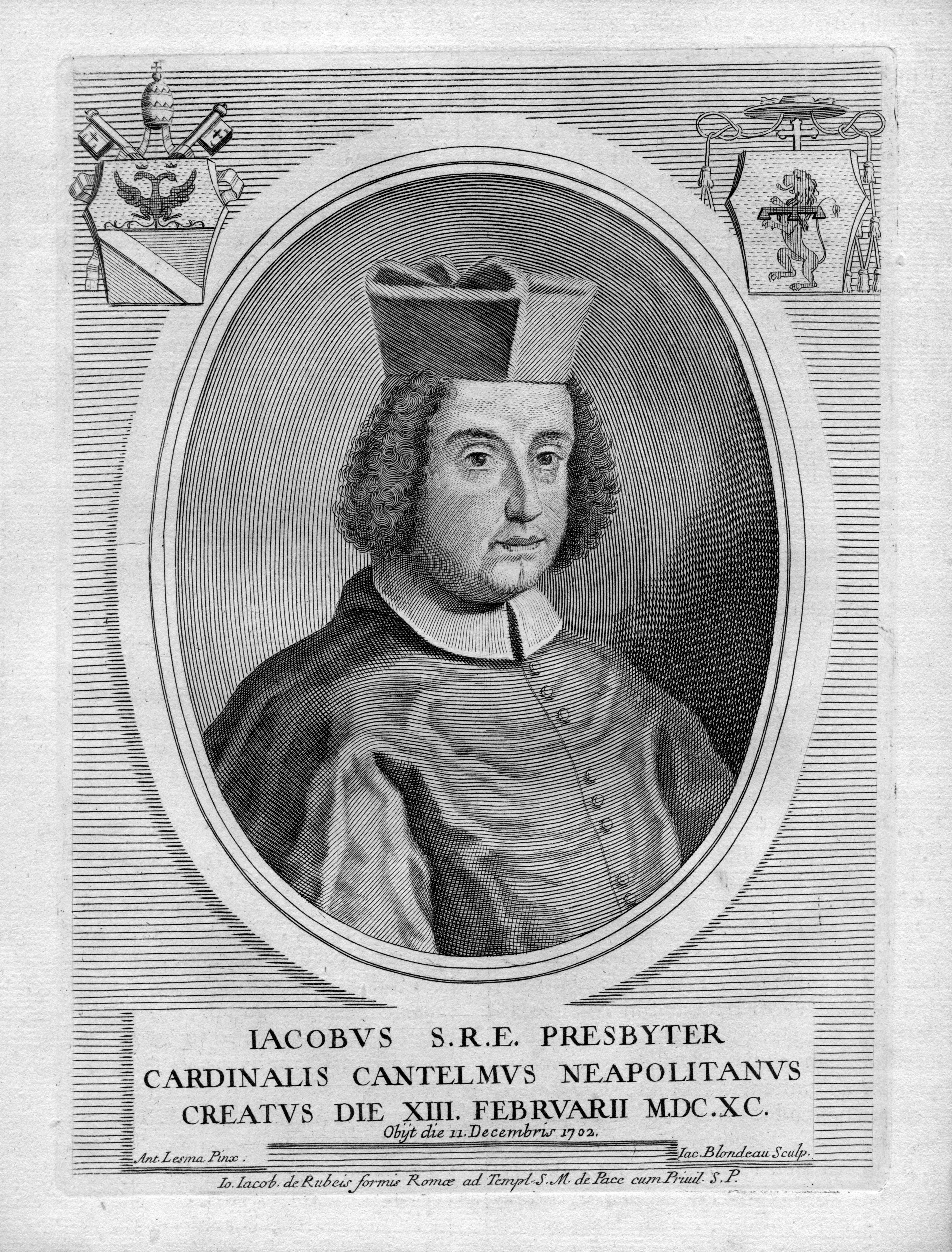 portrait gravé